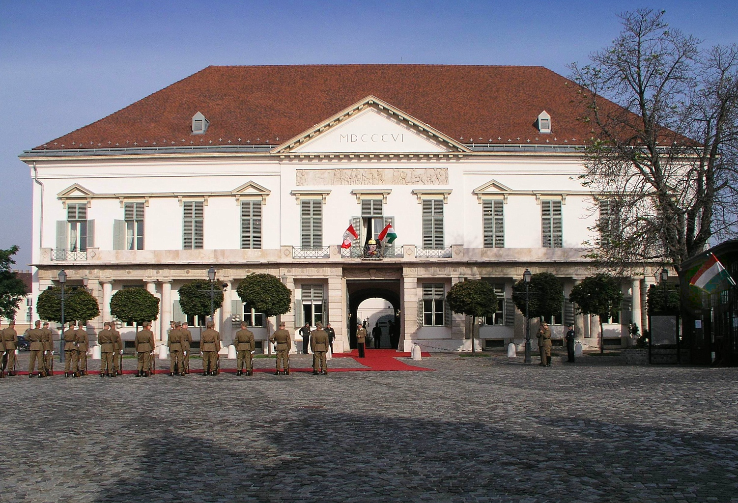 Budapest, Sandor-Palais